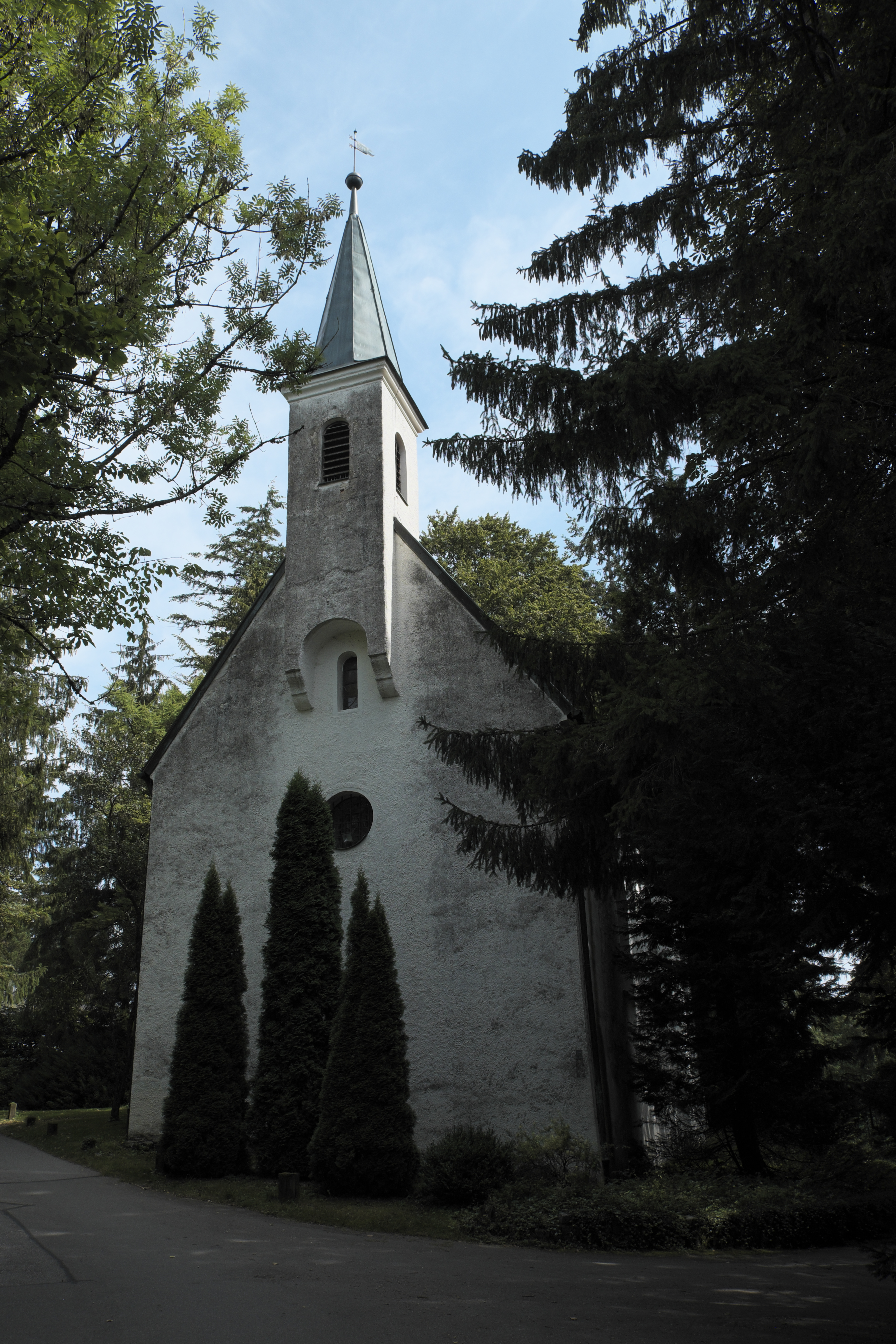 Katholische Filialkirche St. Stephan in Mörlbach, einem Ortsteil von Berg (Starnberger See), im Landkreis Starnberg (Bayern/Deutschland), Dachreiter